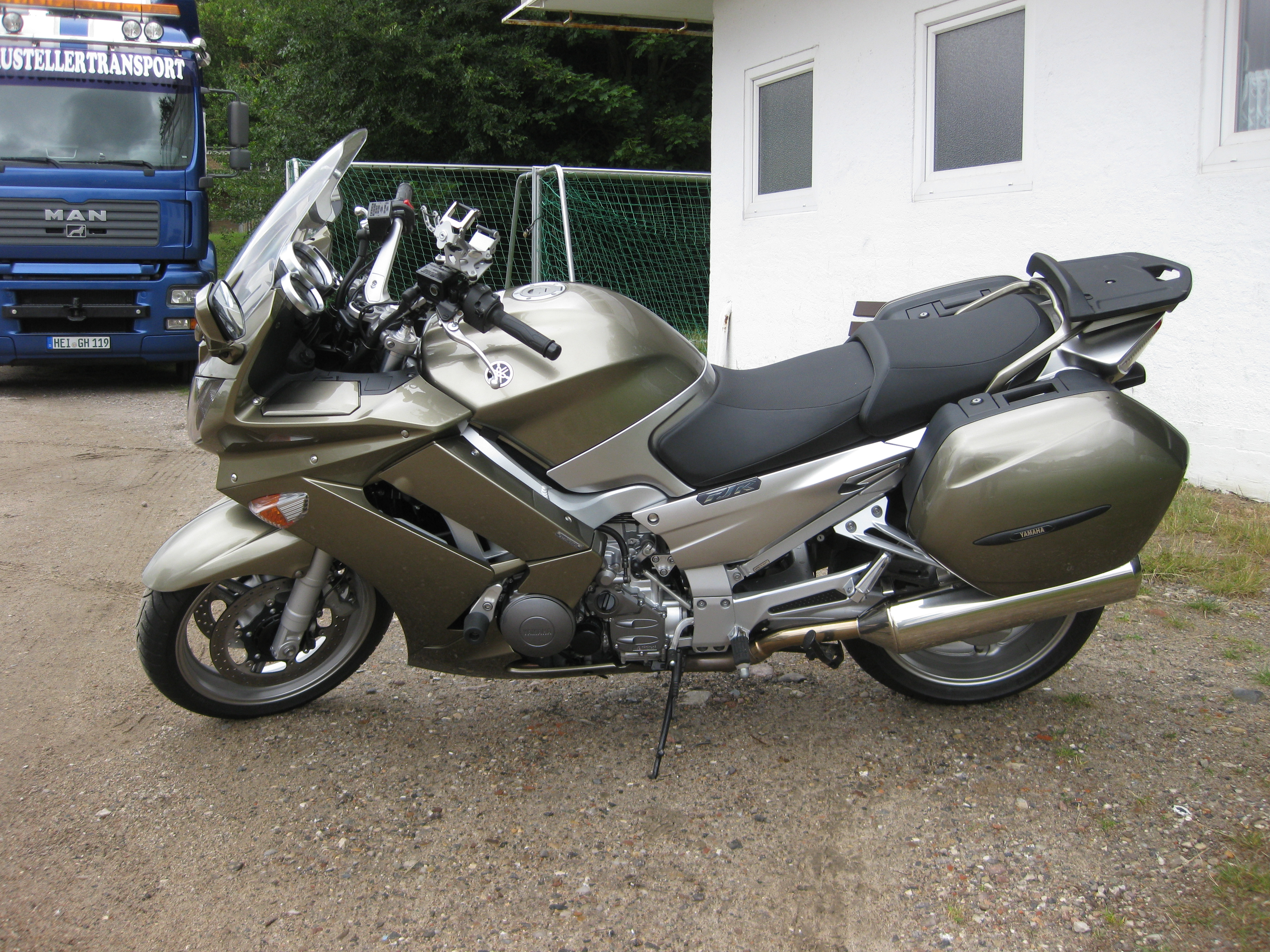 Yamaha FJR Typ RP 11 mit Koffer